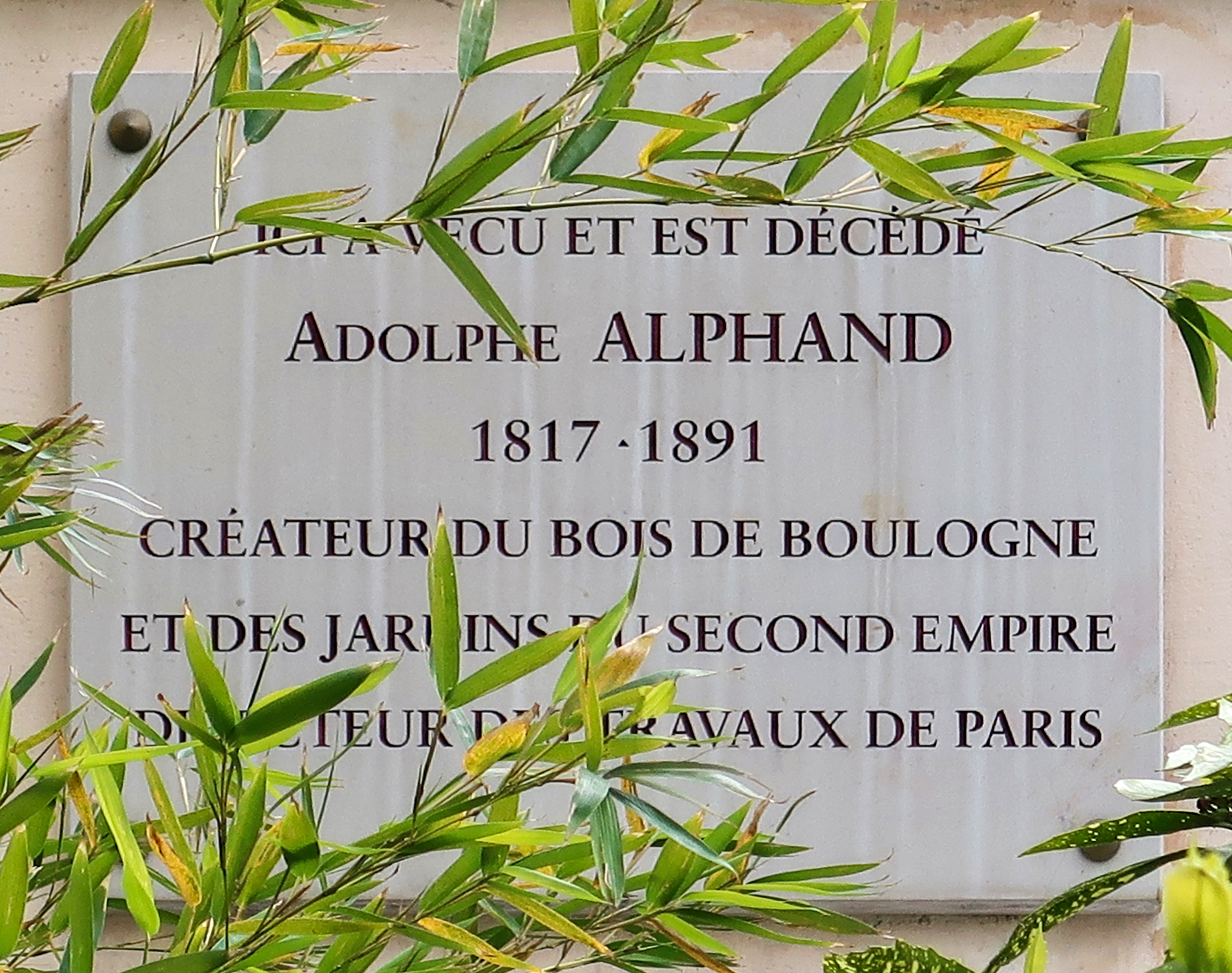 Plaque en hommage à Adolphe Alphand, villa de Beauséjour (Paris, 16e).